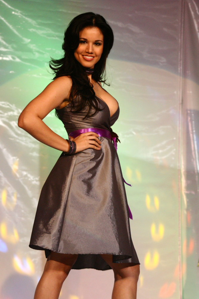 Moda por Matagalpa. Cristiana Frixione